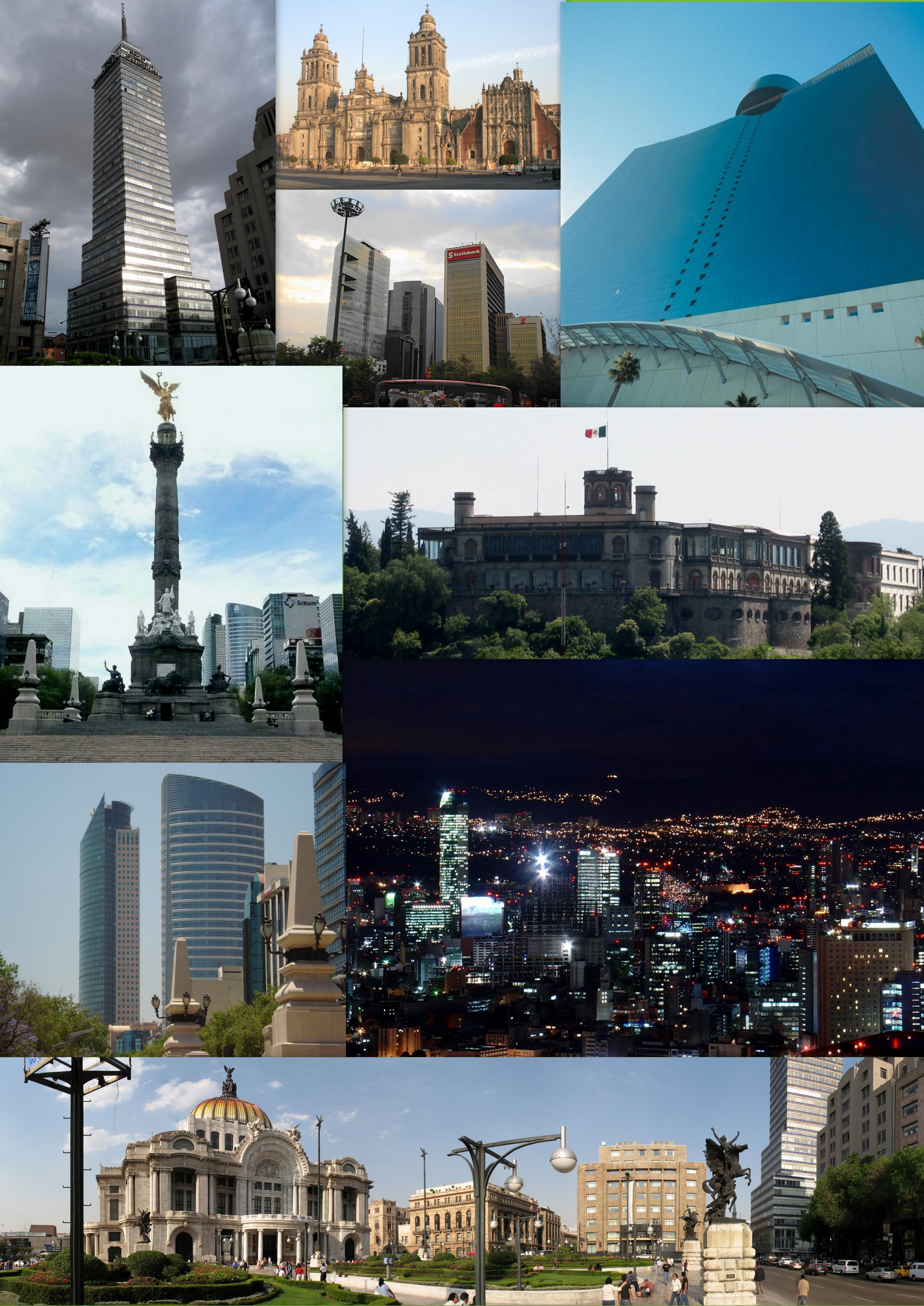 Collage de la cd de México